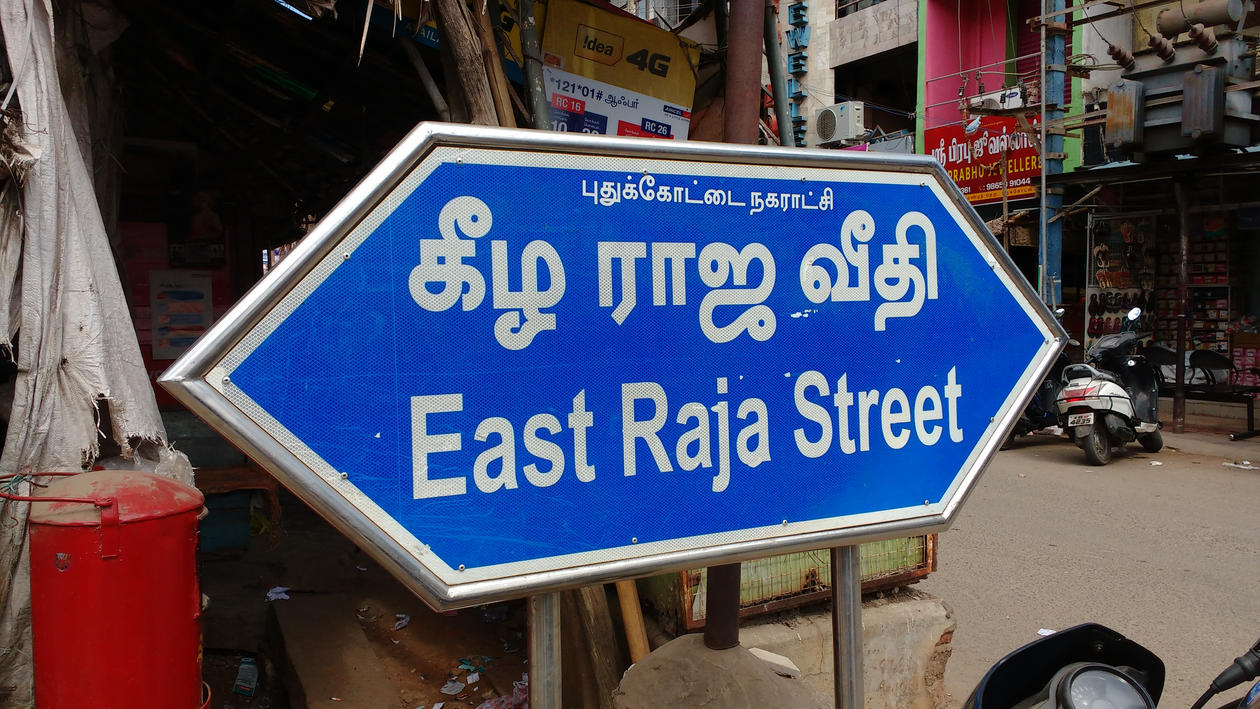 கீழ ராஜ வீதி பெயர்பலகை புதுக்கோட்டை